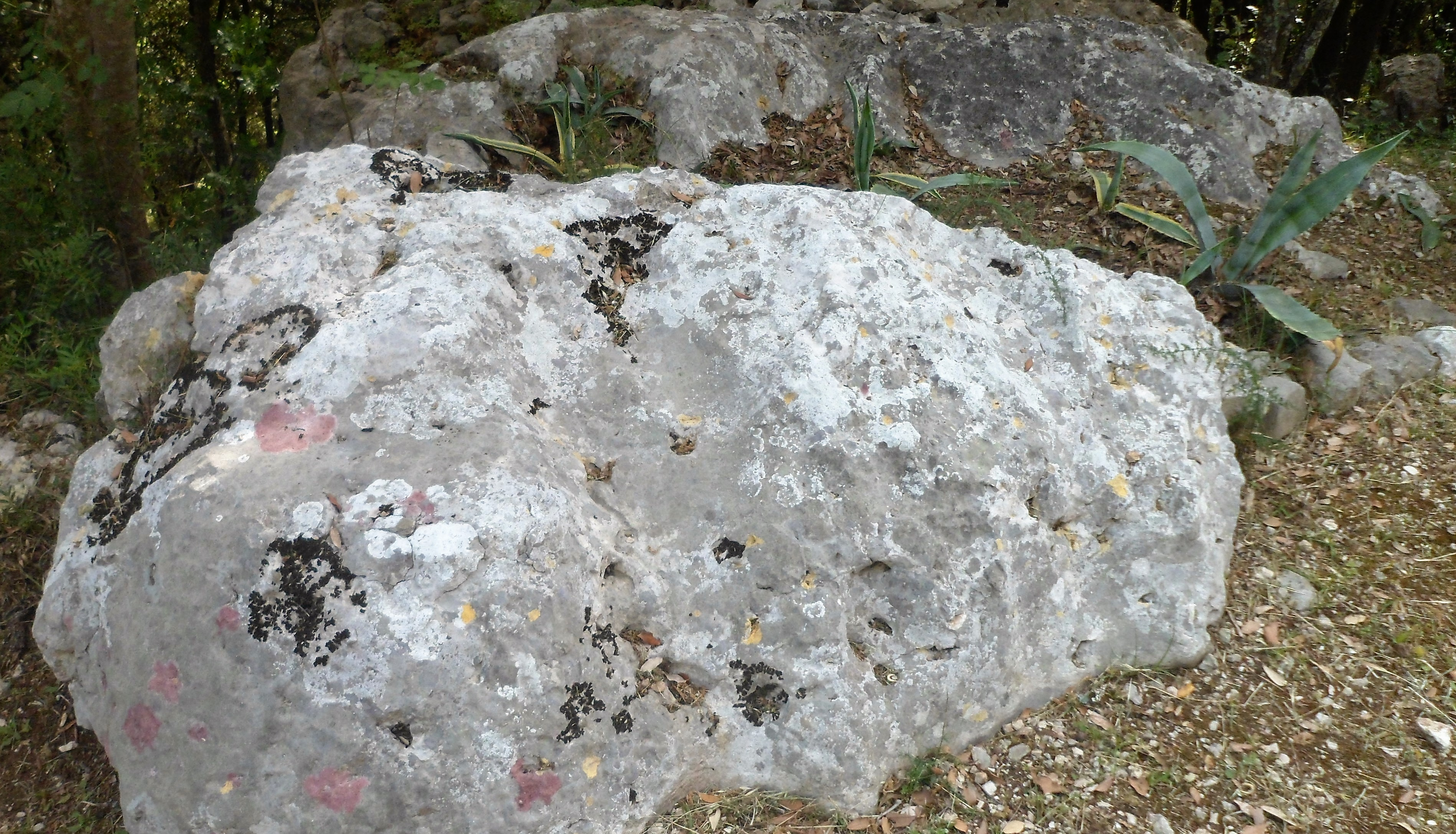 Sasso della Madonna dove si può notare l'impronta della circonferenza lasciata dalla campana secondo la leggenda